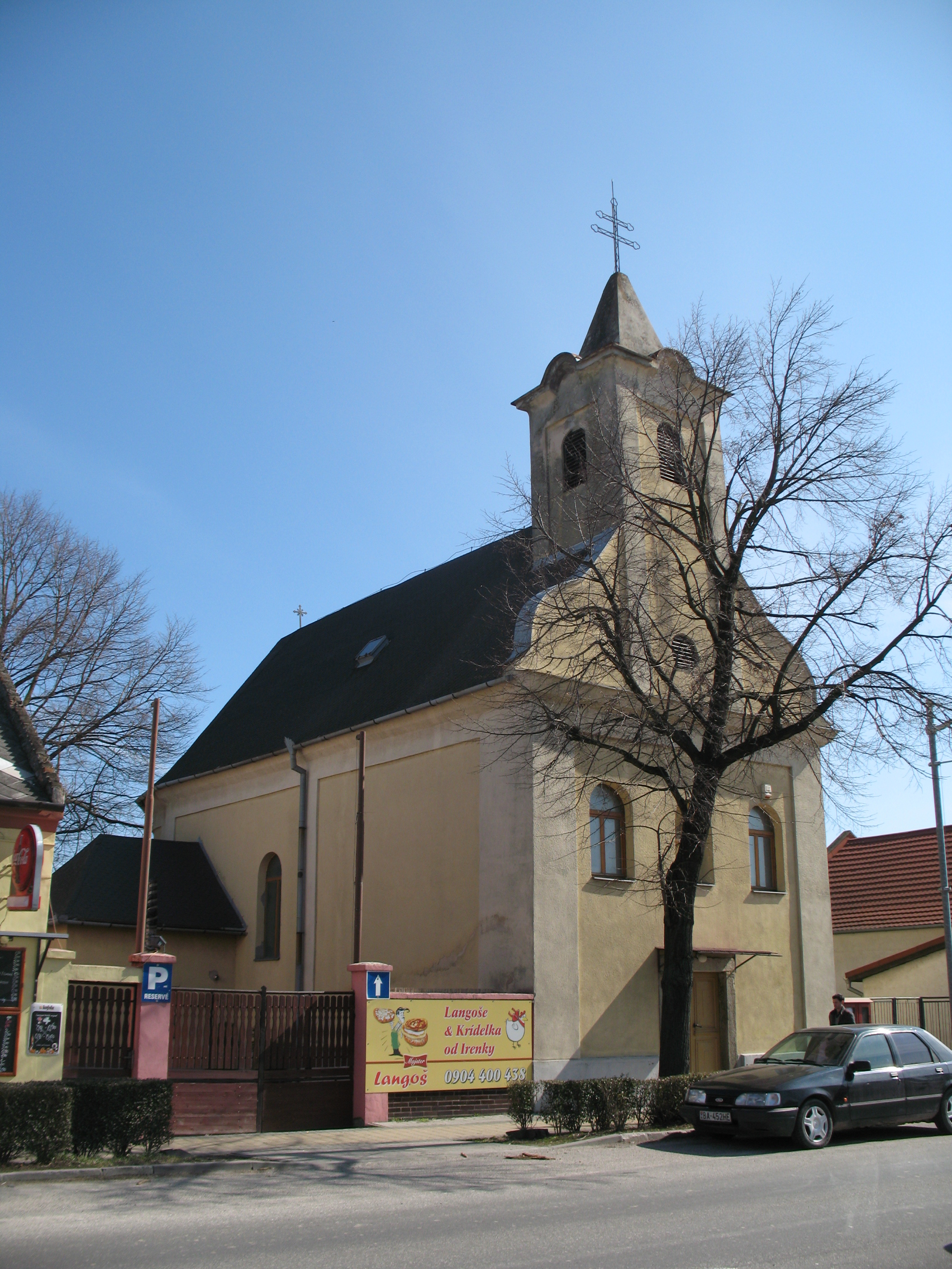 Csölle